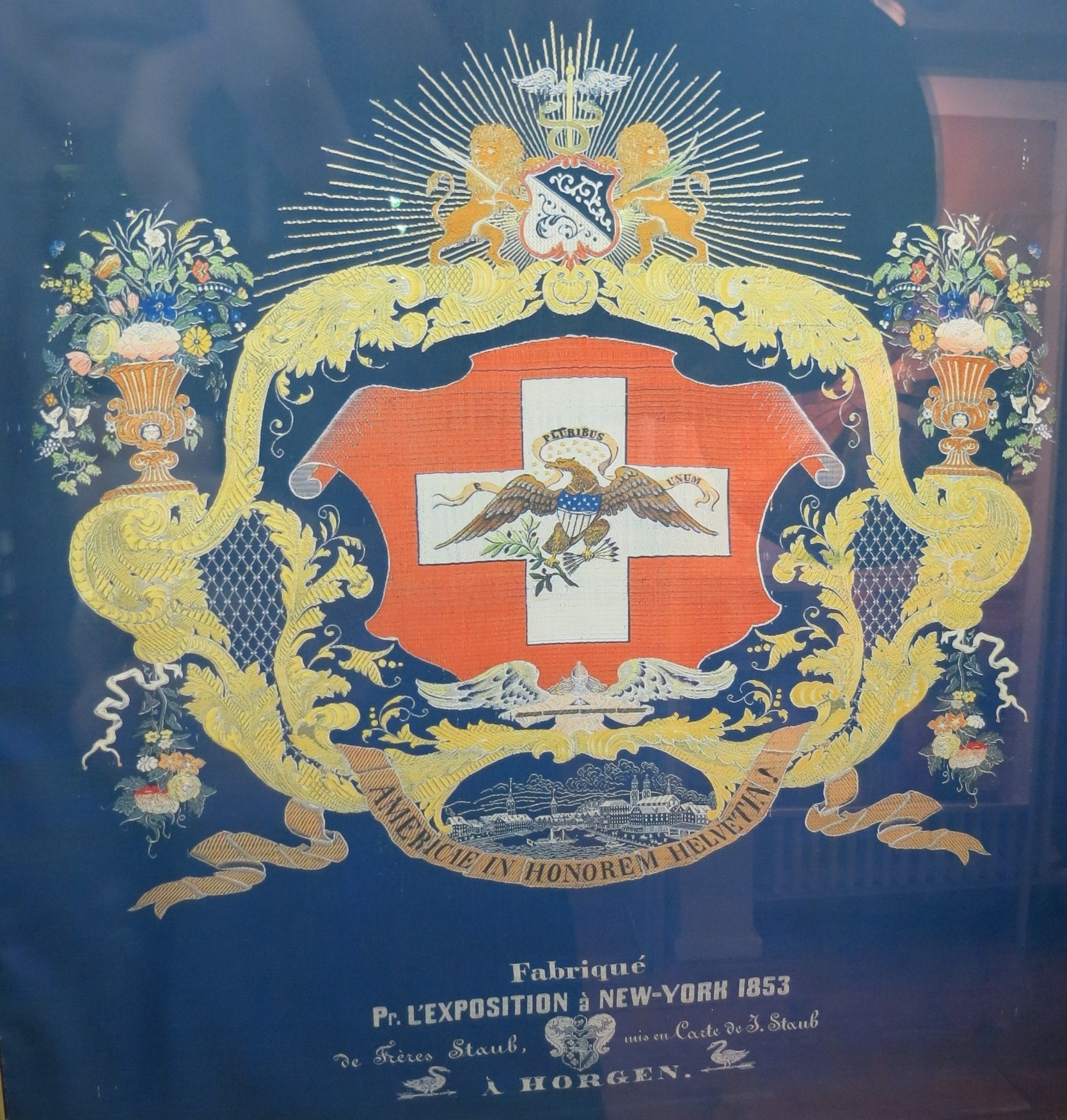 Johann Jakob Staub, Horgen ZH, Schweiz